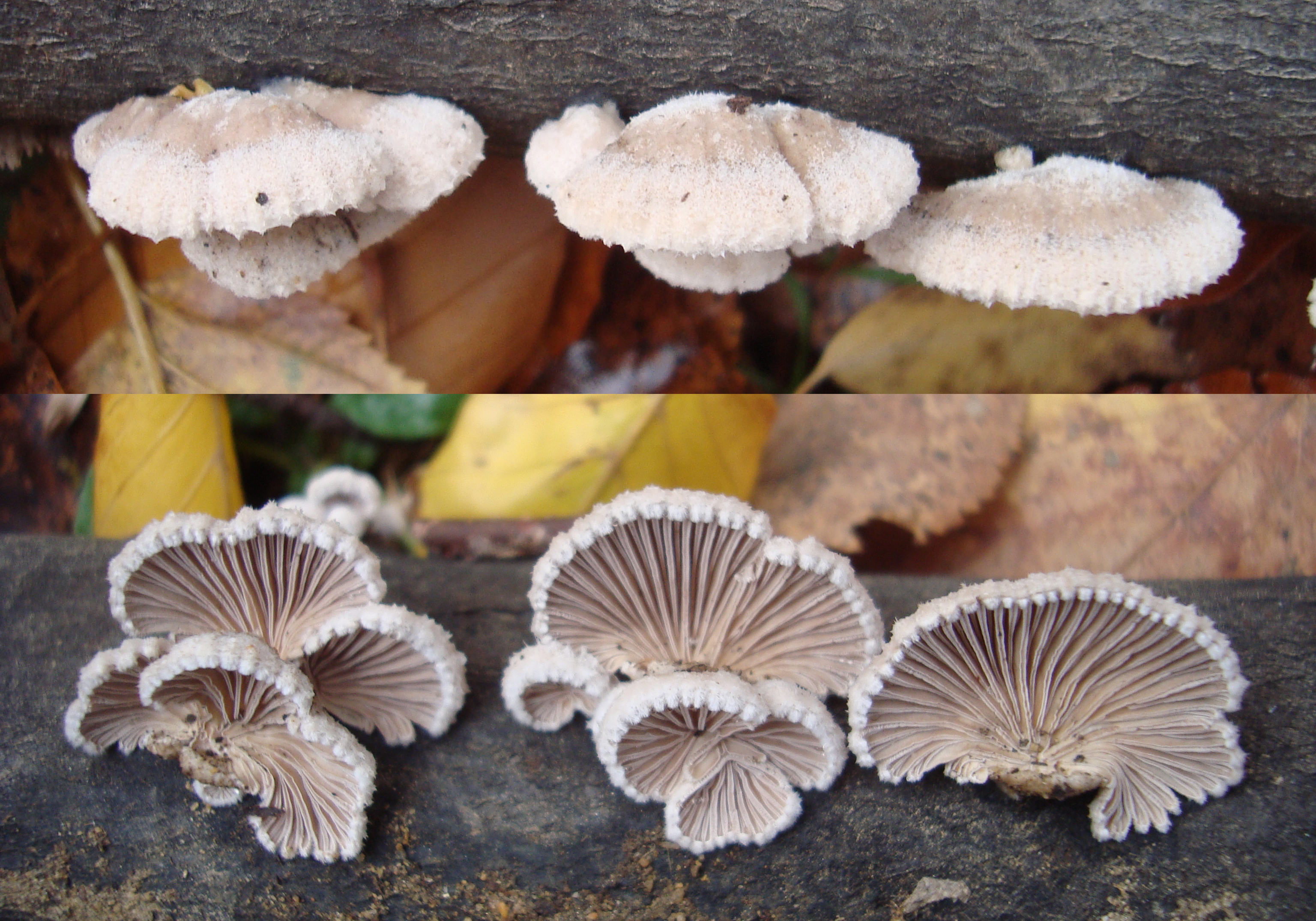 Klanolístka z Podkomorských lesů, Česká republika, jižní Morava